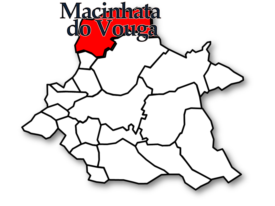 Censos 1864/2011